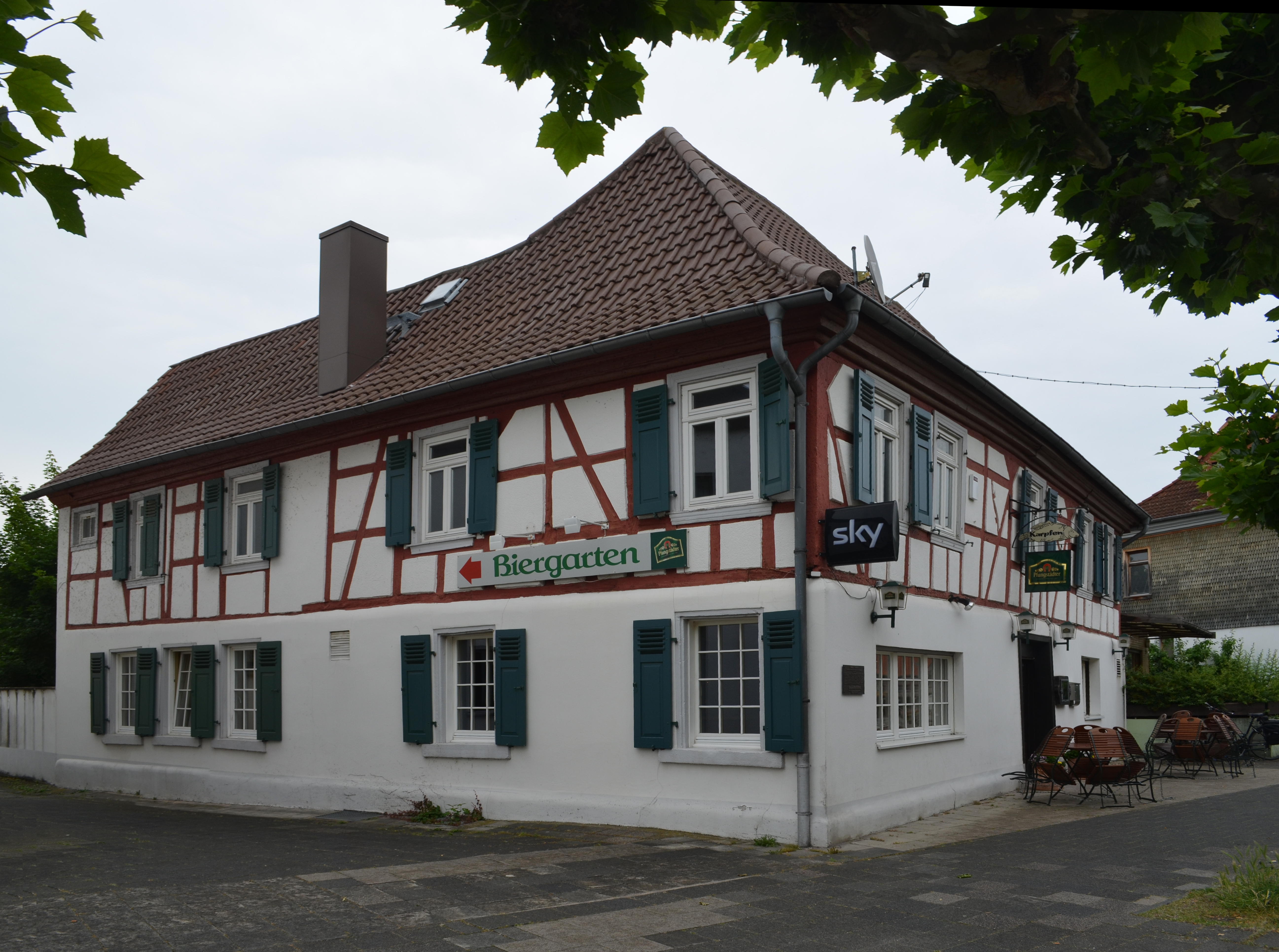 Gernsheim, Rheinstraße 3, Gaststätte Karpfen